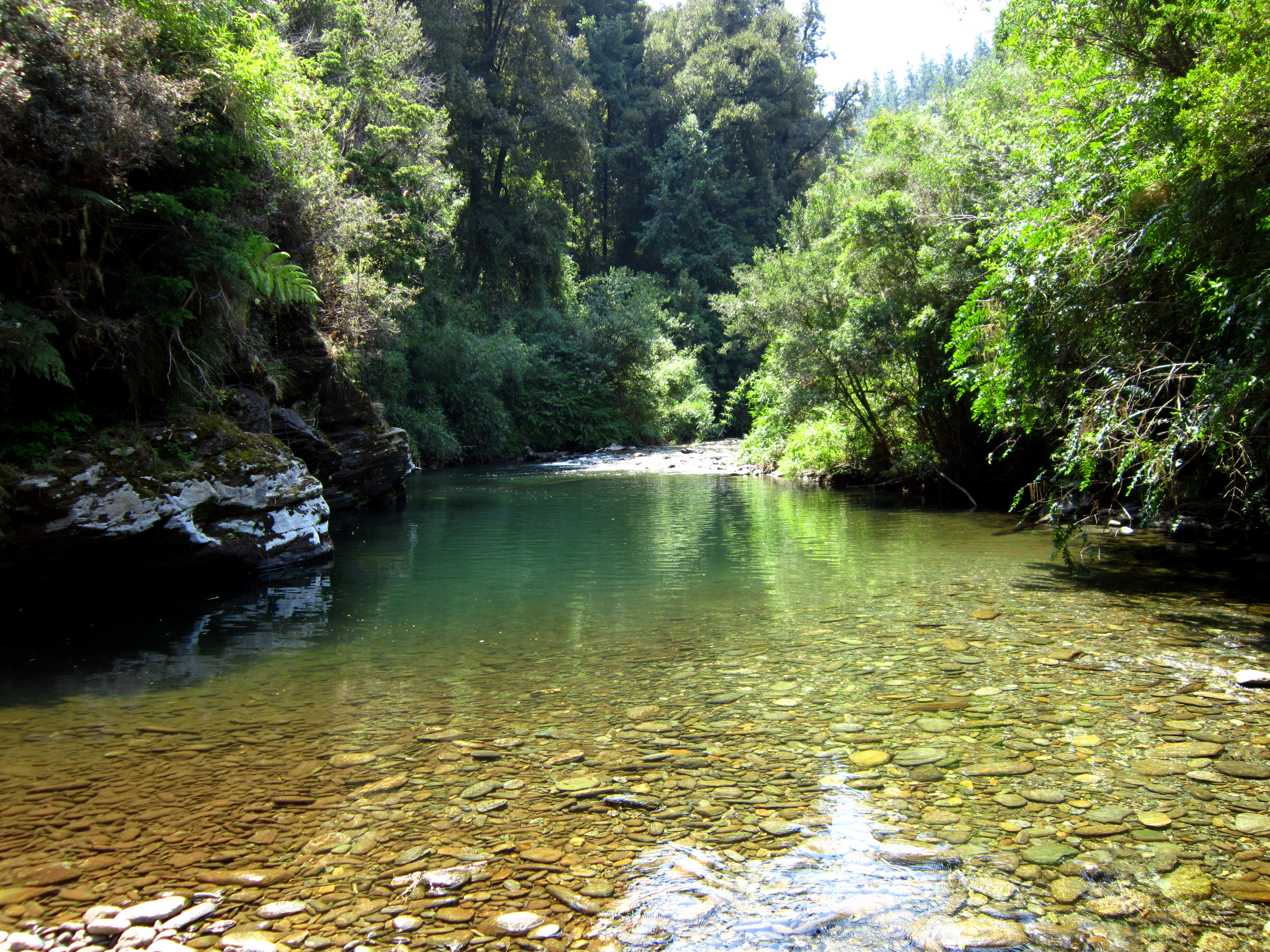 es un río de menor tamaño ubicado en las entrañas de Nahelbuta sur.